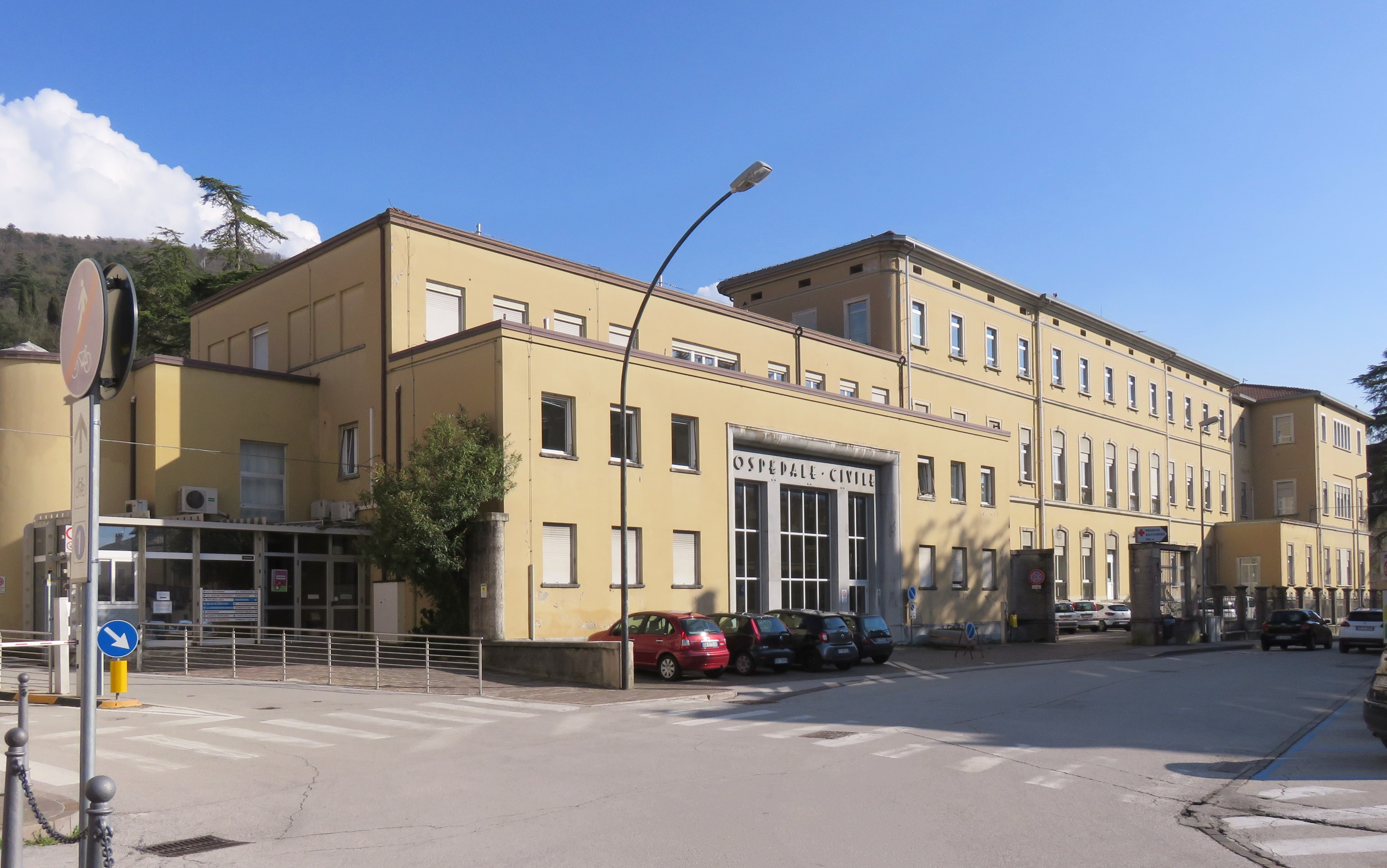 Ospedale civile, parte più antica